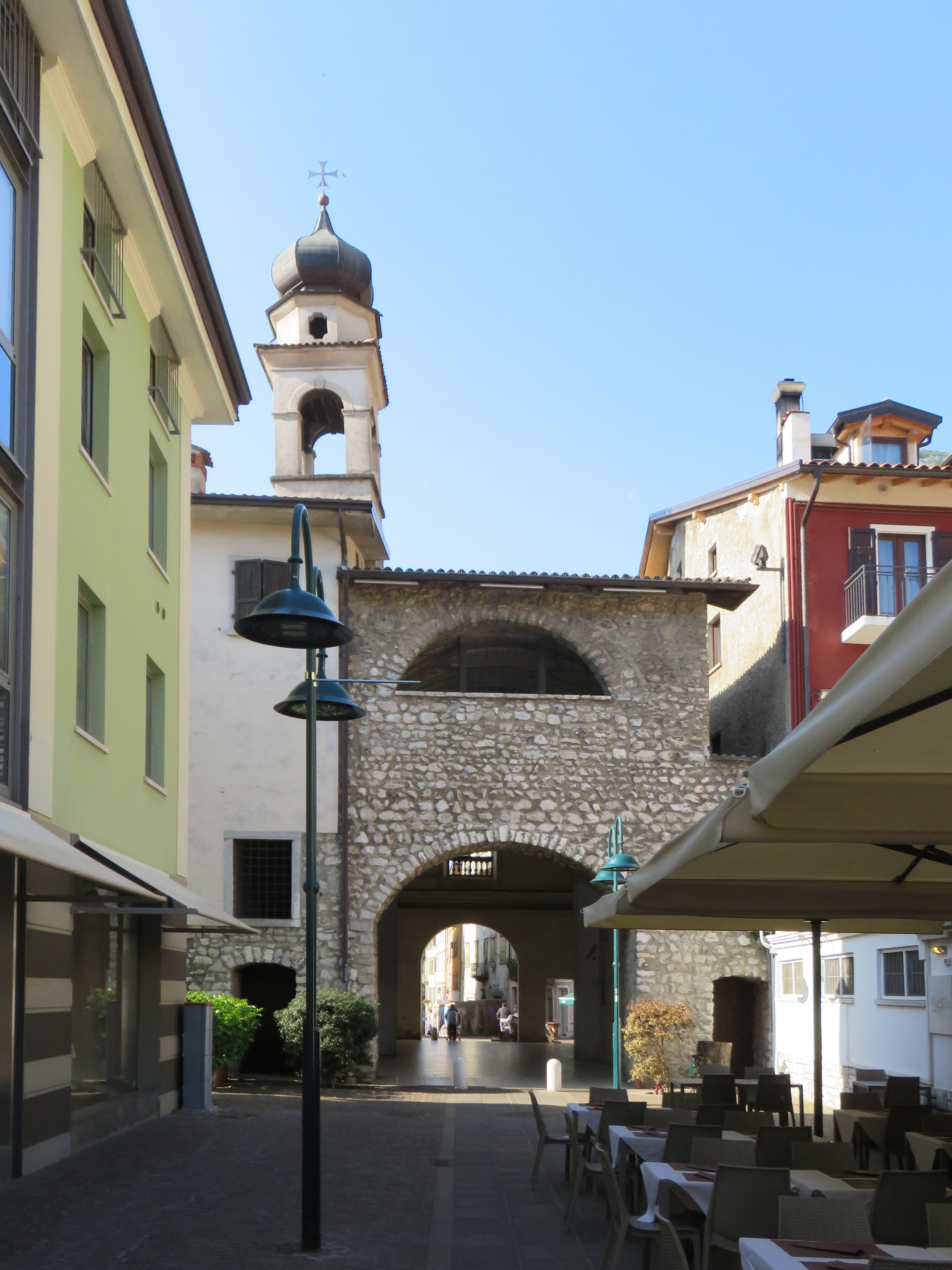 Ex Chiesa di San Giuseppe o Chiesa dei Disciplini, ora Porta San Giuseppe - Zona abside